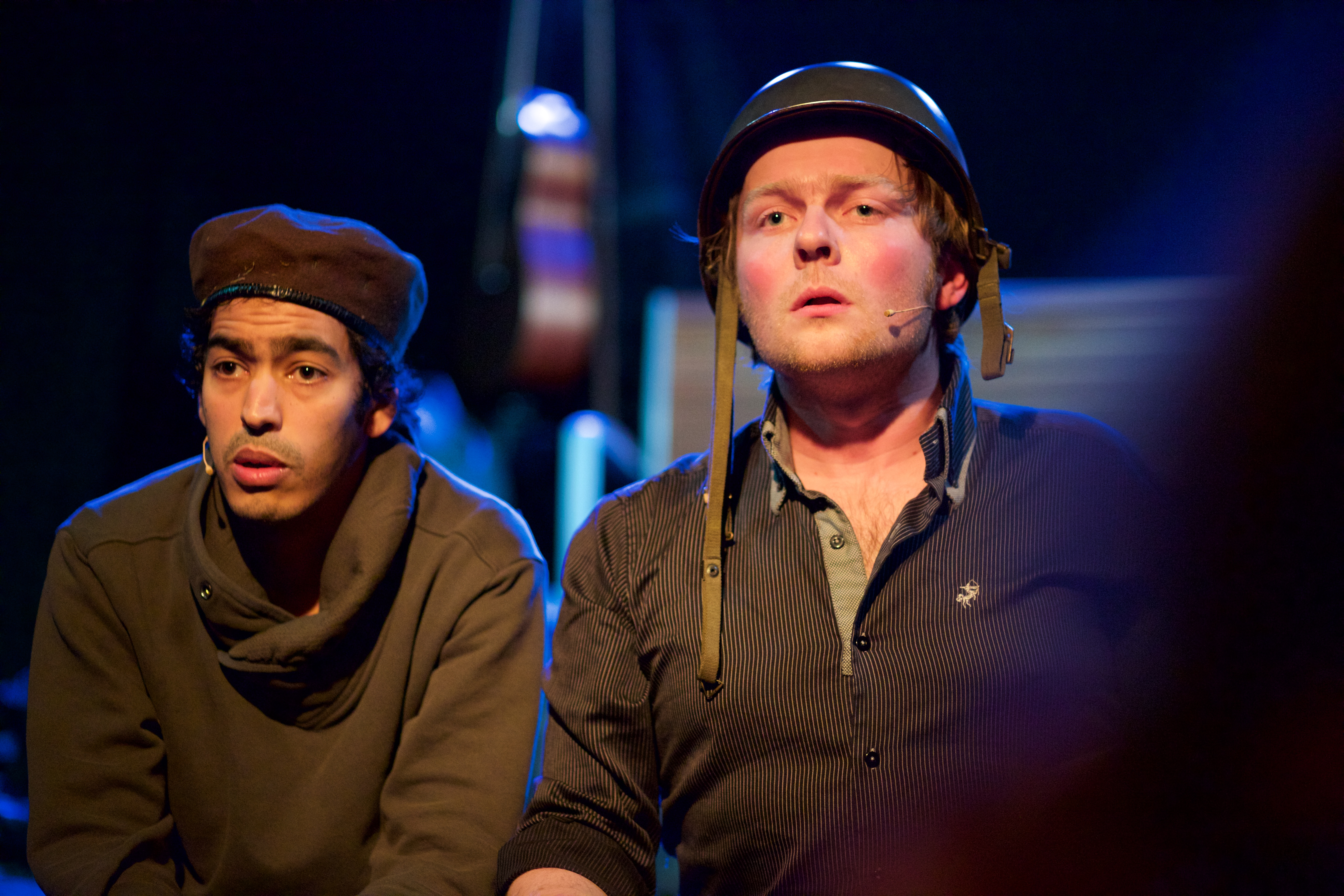 Marcel Harteveld en Johan Fretz tijdens een try-out in februari 2015 in het Werftheater in Utrecht.